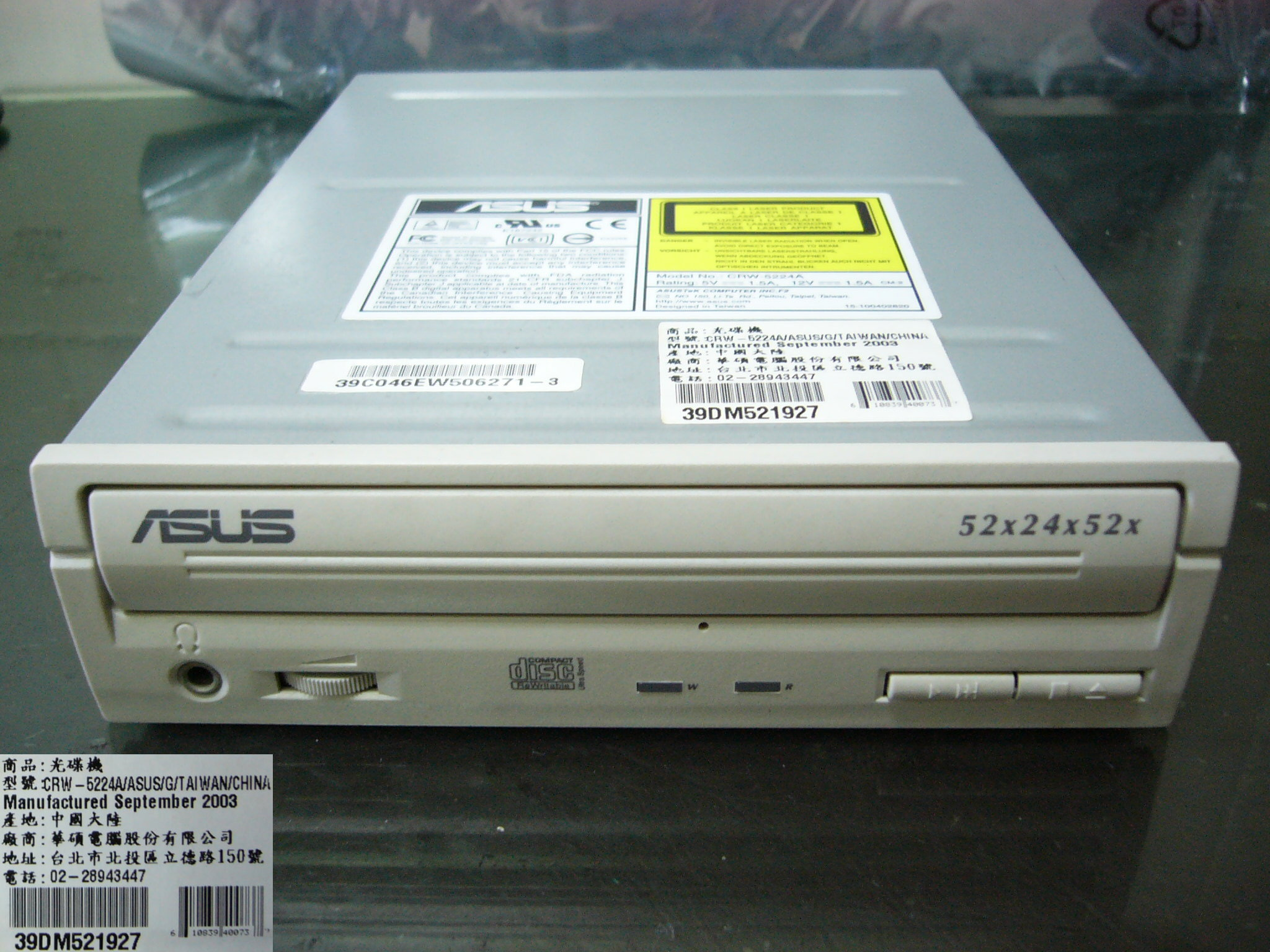 中文（台灣）: 華碩電腦CD燒錄機CRW-5224A正面。